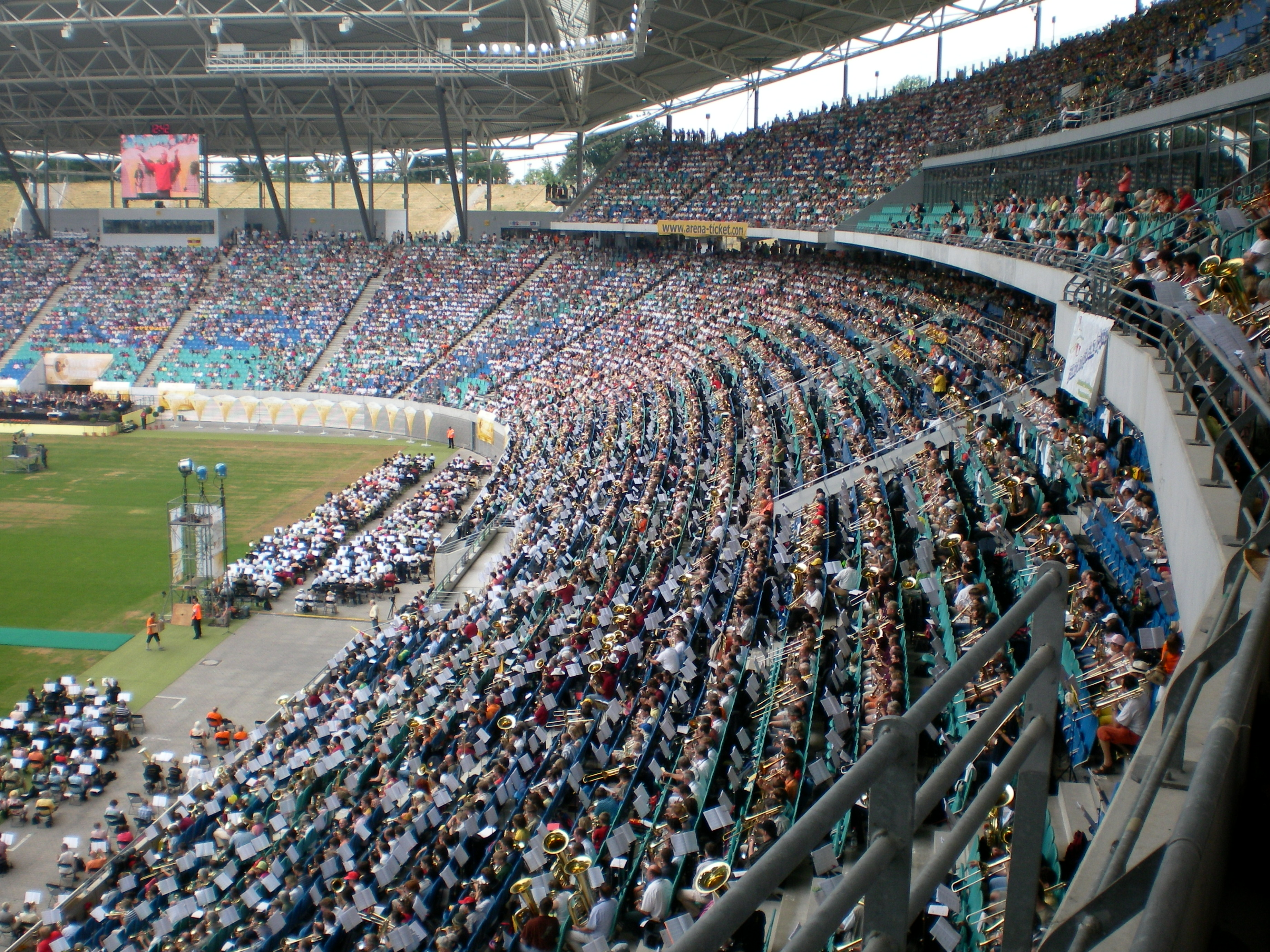 Bild Abschlußgottesdienstes des Deutschen Posaunentages 2008 in Leipzig